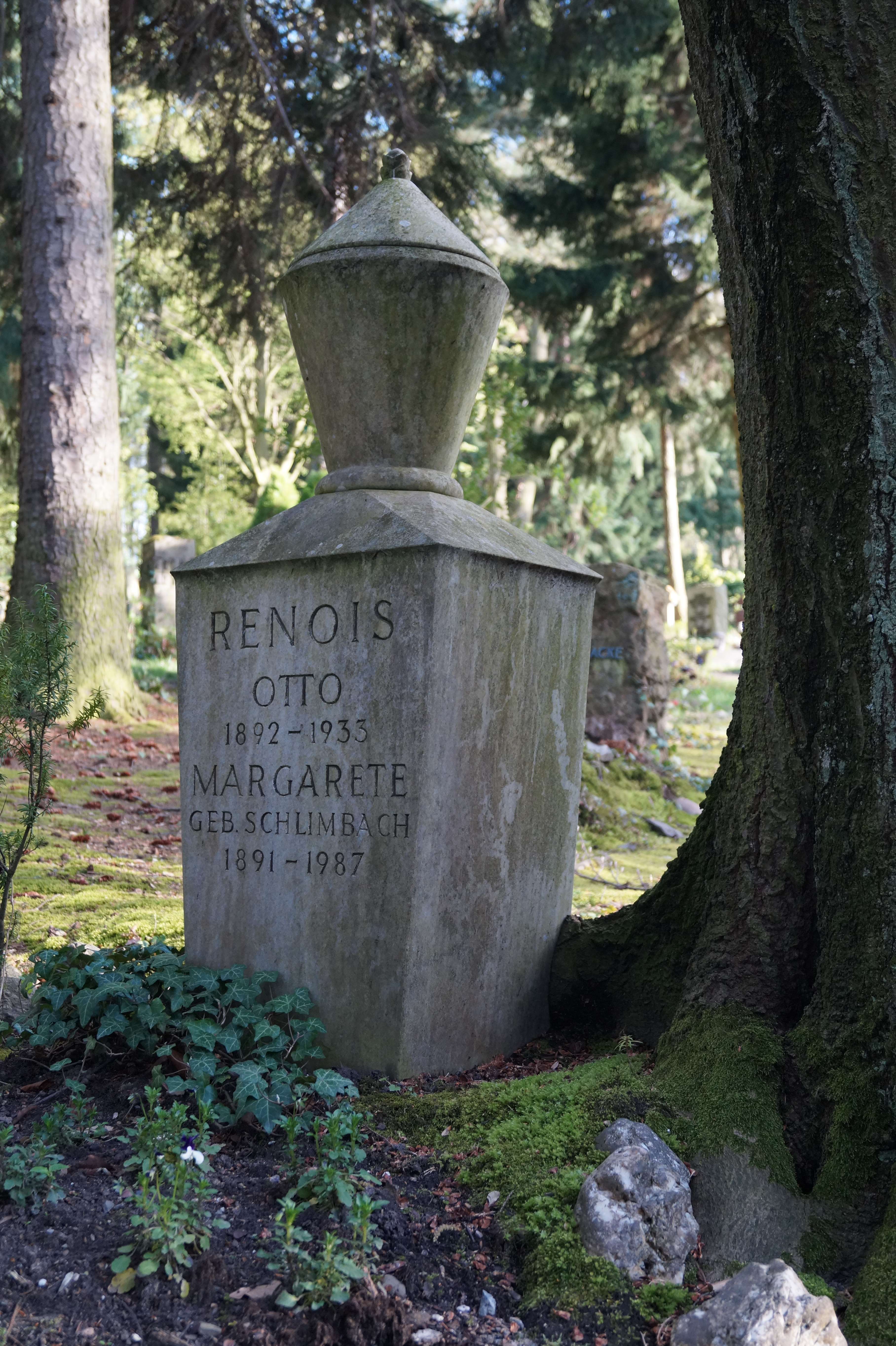 Grab von Otto Renois (1892-1933), Schreiner, Bonner Stadtverordneter (KPD), erstes Opfer des Nationalsozialismus in Bonn